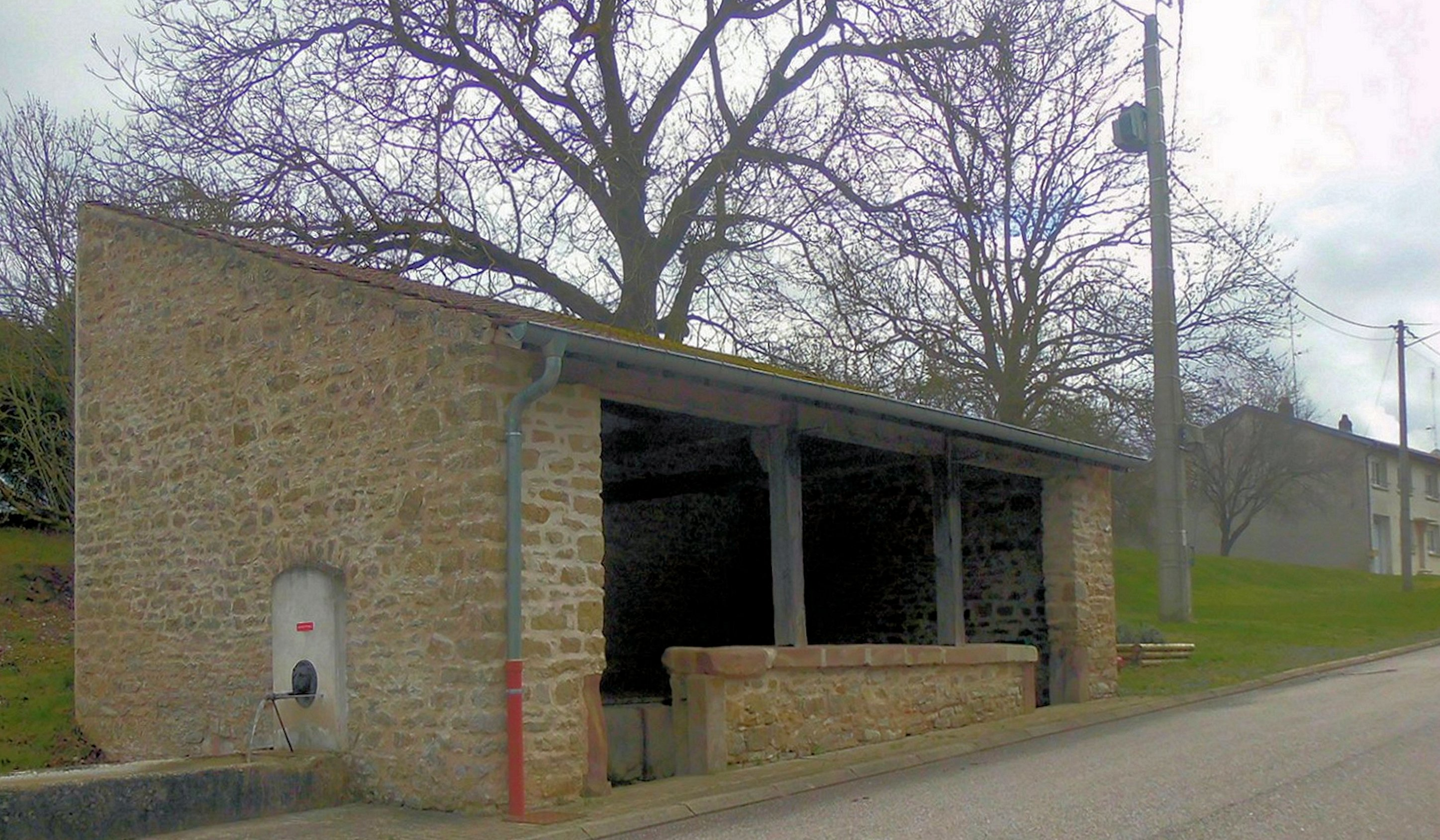 L'ancien lavoir de Vennezey